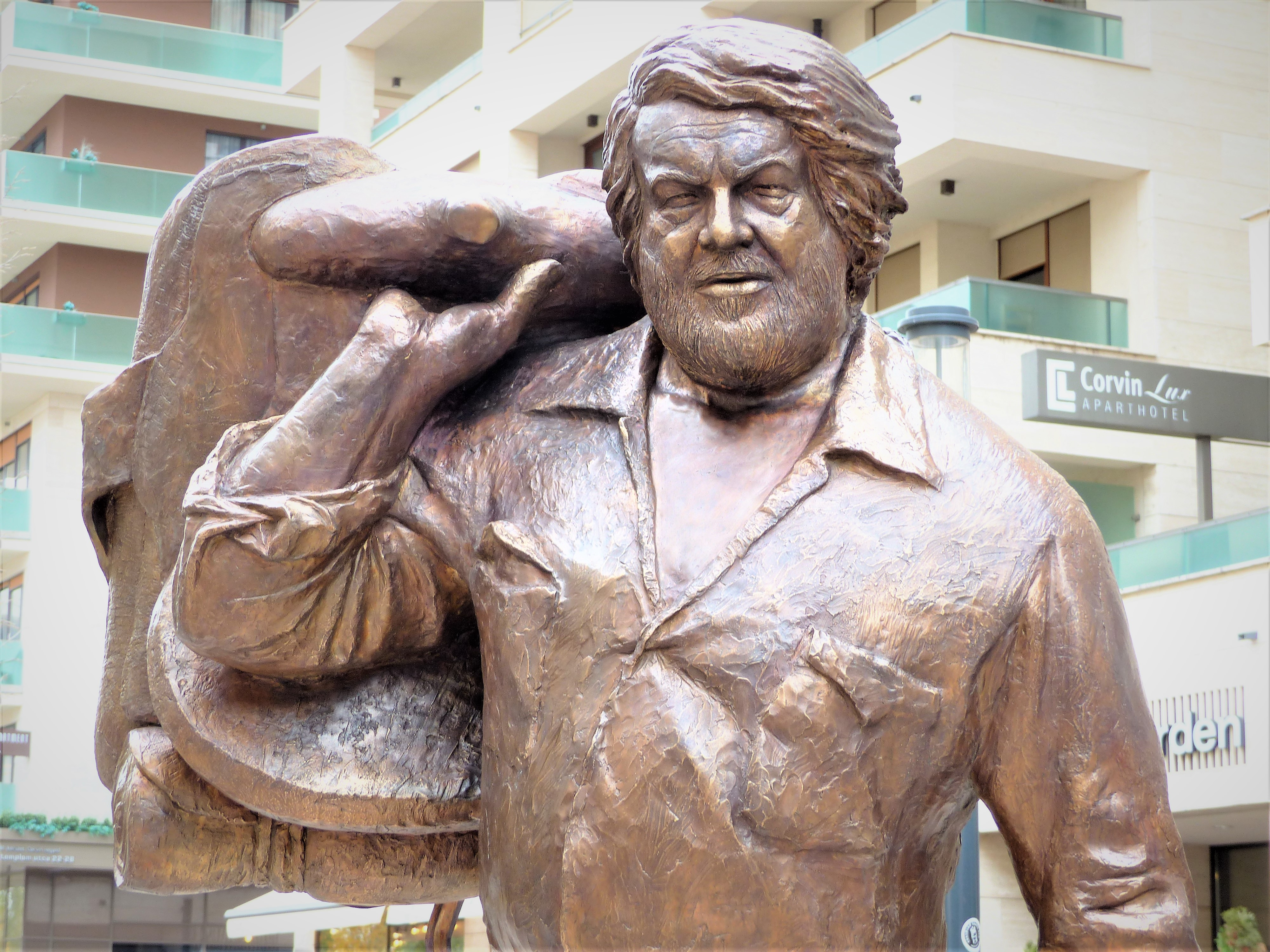 Bud ̠Spencer. A felvétel 2017. november 12-én, vasárnap készült a Józsefvárosban, a Corvin sétányon. Felavatták Bud Spencer szobrát Budapesten 20171112